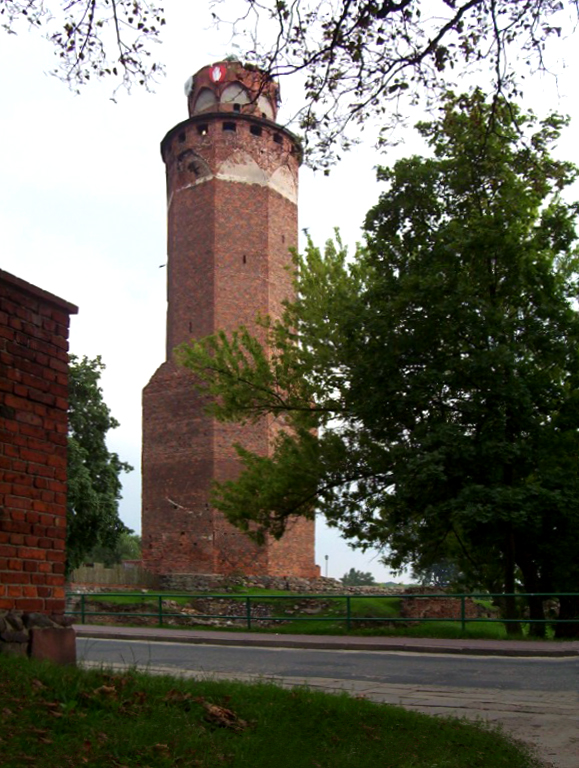 Brodnica, wieża zamkowa